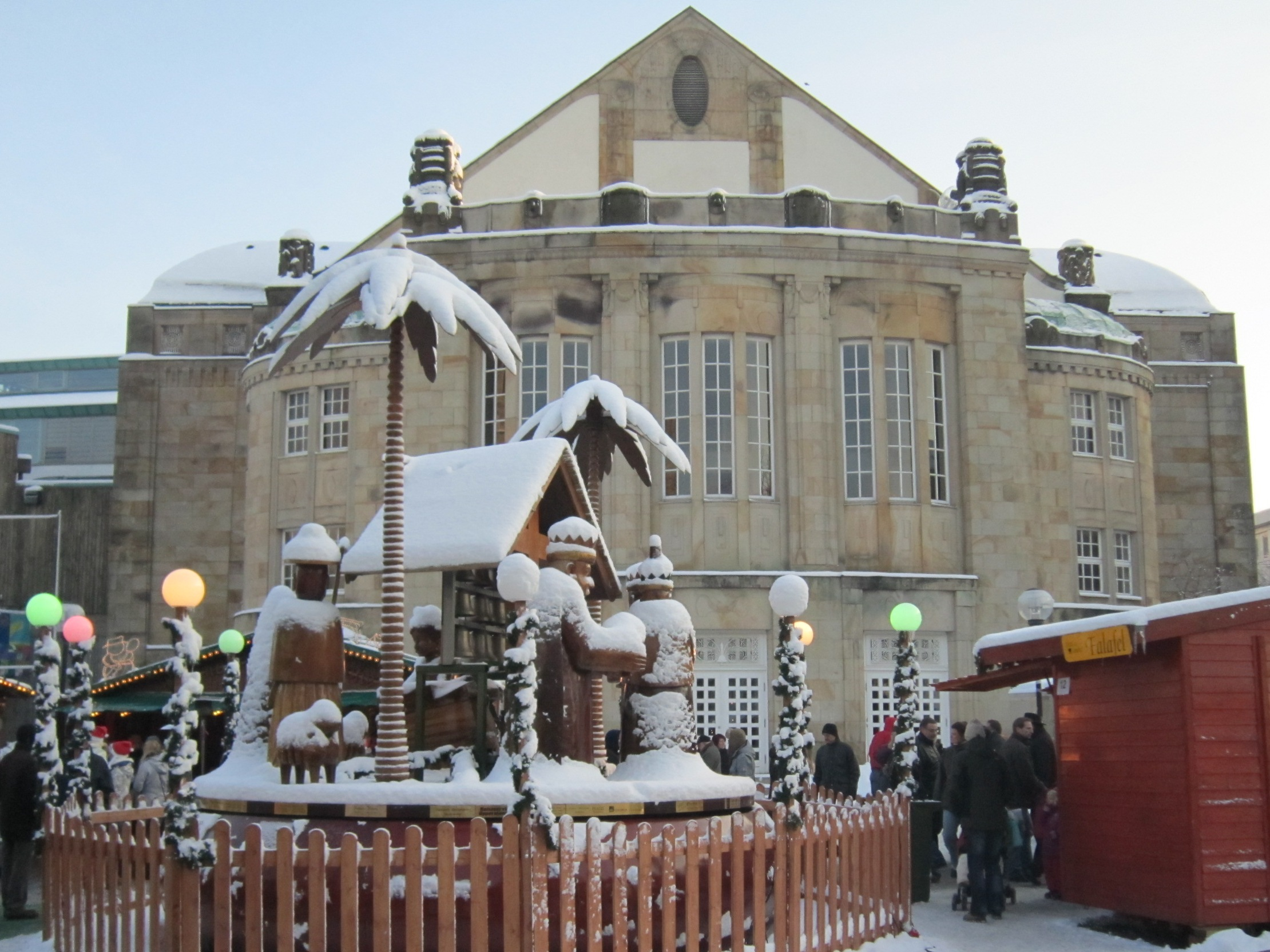 Theater Osnabrück. Im Vordergrund die Spieldose des Osnabrücker Weihnachtsmarktes